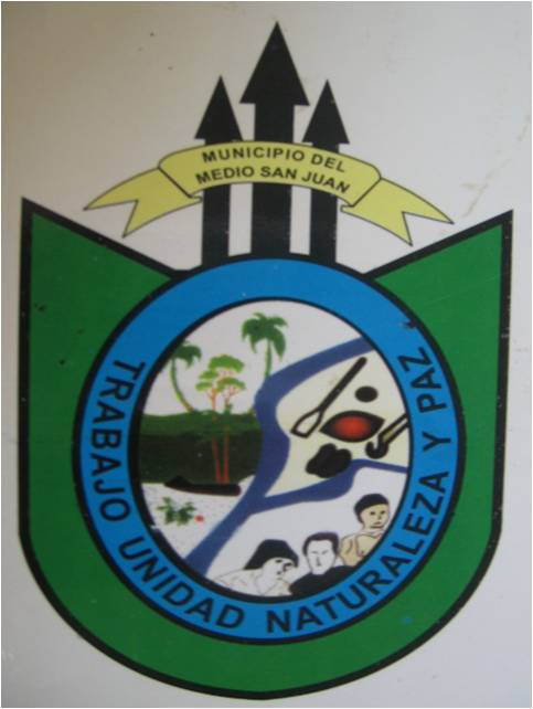 Este tiene un elipse que forma el corazón, el cual esta cubierto por una franja y un aro de color azul en representaciòn del abundante recurso hìdrico que posee el territorio. Esta franja esta rodeada por una franja de color verde que representa la riqueza natural y la biodiversidad que posee el territorio. El color gris es de gran importancia, ya que significa la esperanza que tiene de progresar. El corazòn esta dividido en tres partes cada una bañada por el principal rio (EL SAN JUAN) de donde proviene el nombre de sus municipios y sus afluentes. En la parte oriental un amarillo que representa las herramientas utilizadas por la poblaciòn en la explotaciòn minera, conviritiendo esta actividad en la principal fuente de ingresos para gran número de habitantes de la regiòn. En la parte noroccidental se encuentran nuestras plantas que representan los recursos naturales y la biodiversisdad resaltando la madera y el fruto de borojo. En la parte sur oriental encontramos a un indio, un blanco y a un negro que representan las tres razas que habitan en el municipio, siendo la primera en habitar el territorio.